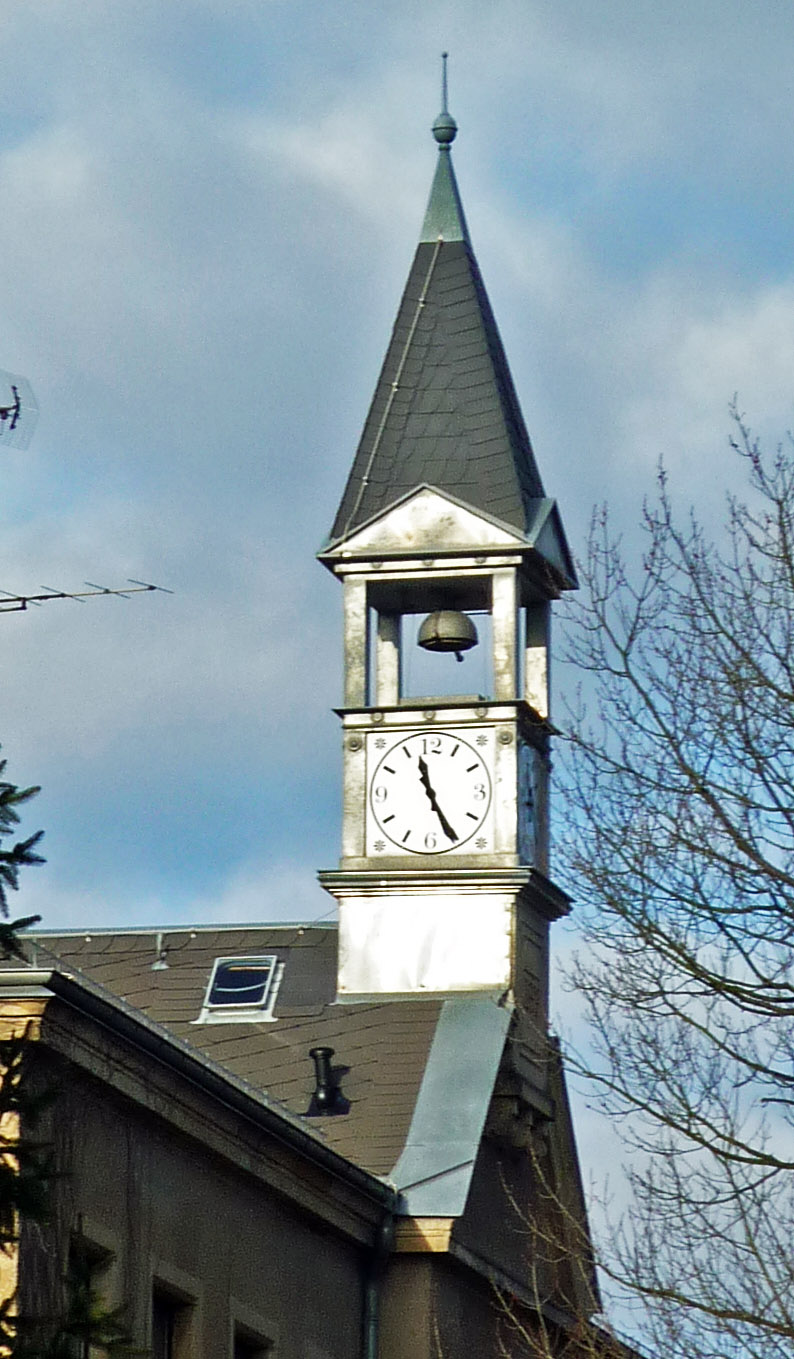 Dachreiter der Schule (Steigerstraße) in Kleinnaundorf (Freital) in Sachsen